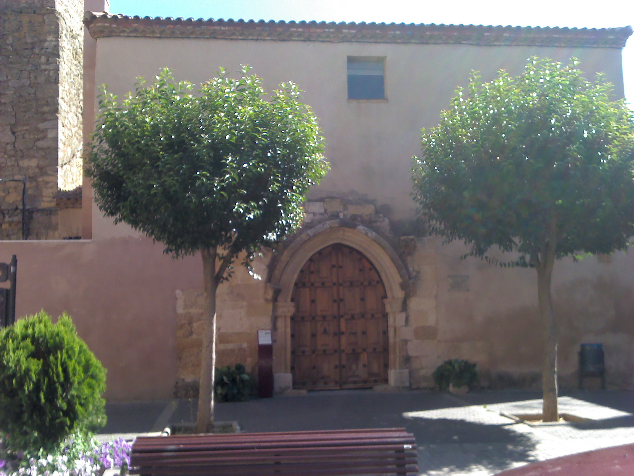 Iglesia de San Martín (actual casa de cultura) perteneciente al Recinto Amurallado de Mansilla de las Mulas.